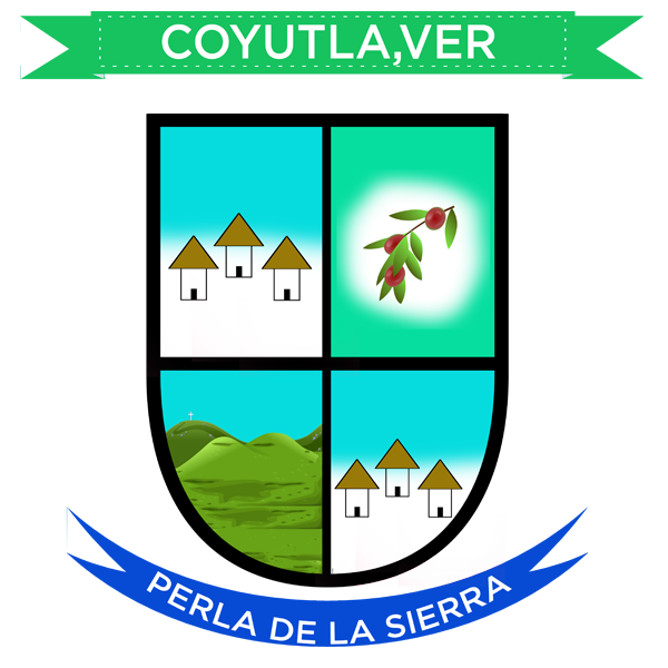 Este escudo representa el dile rasgo de los coyutecos, y de las personas indígenas de nuestros ante pasados.